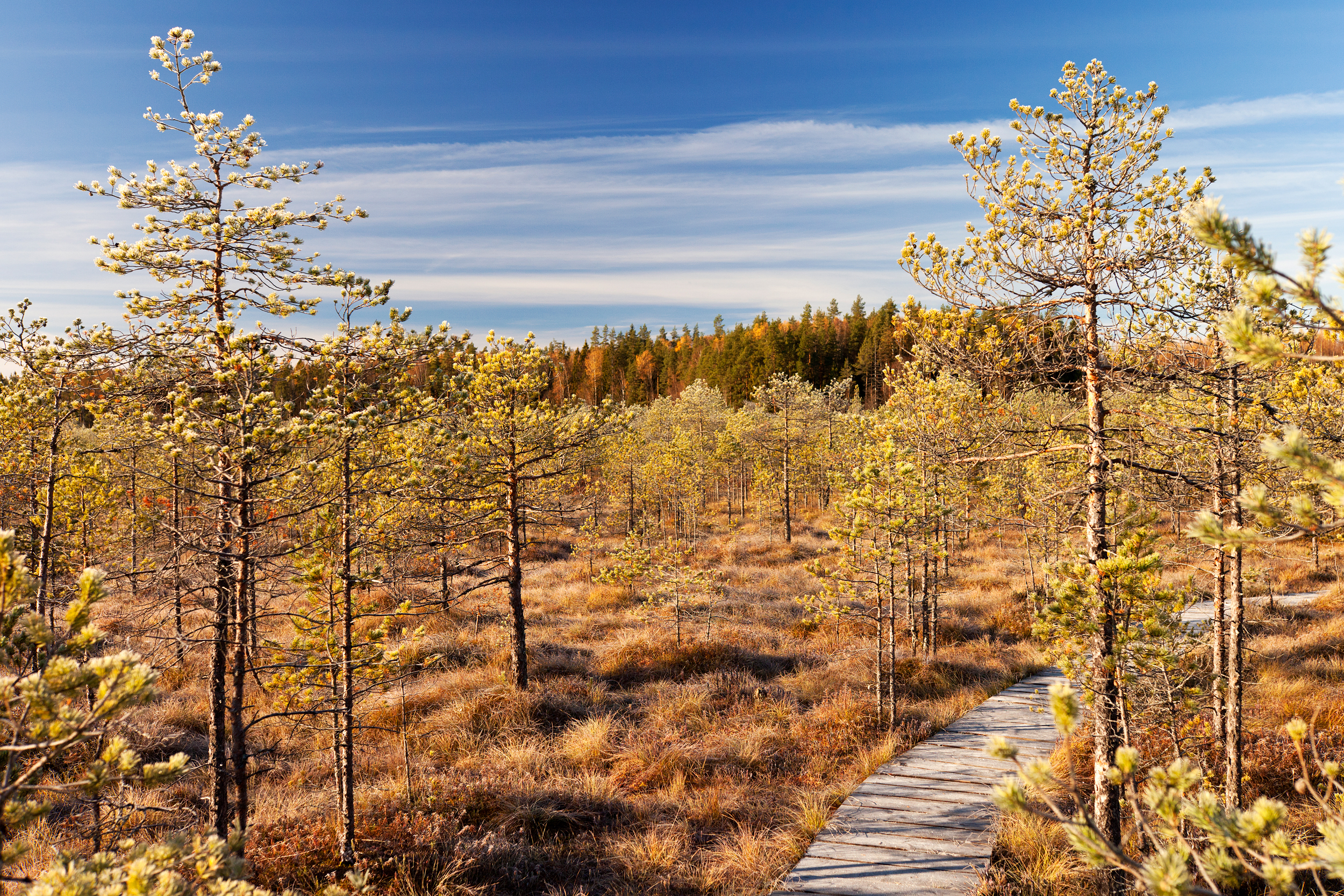 Valgesoo maastikukaitseala